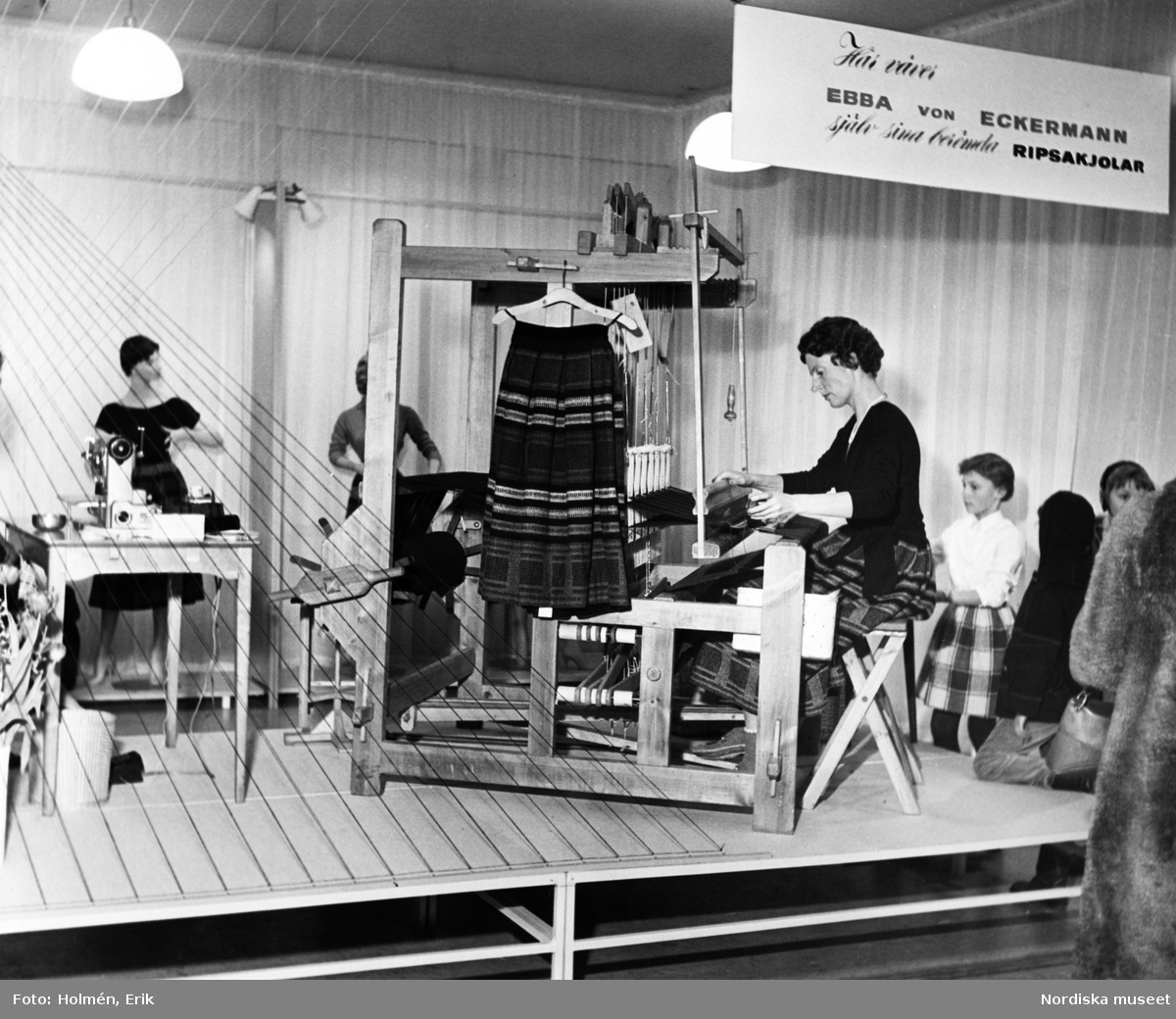 Ebba von Eckermann sitter vid en vävstol och väver Ripsakjolar. På vävstolen hänger en Ripsakjol på en galge. Vid sidan står några barn. I bakgrunden står två skyltdockor klädda i Ripsakjolar.